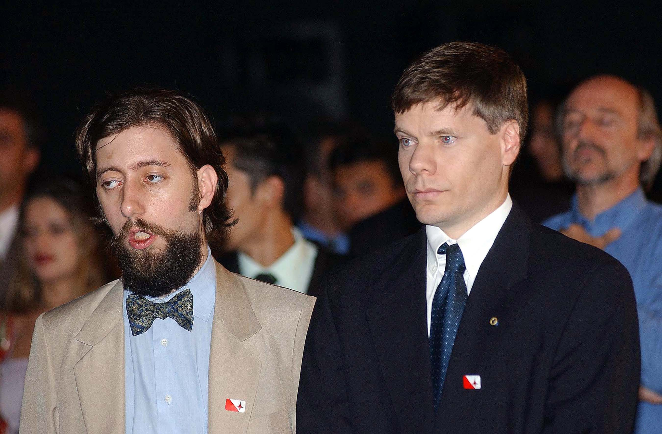 Alexandre e Marcos Vilares, sobrinhos-bisnetos de Santos Dumont, na cerimônia de inscrição de Santos Dumont como herói da pátria.